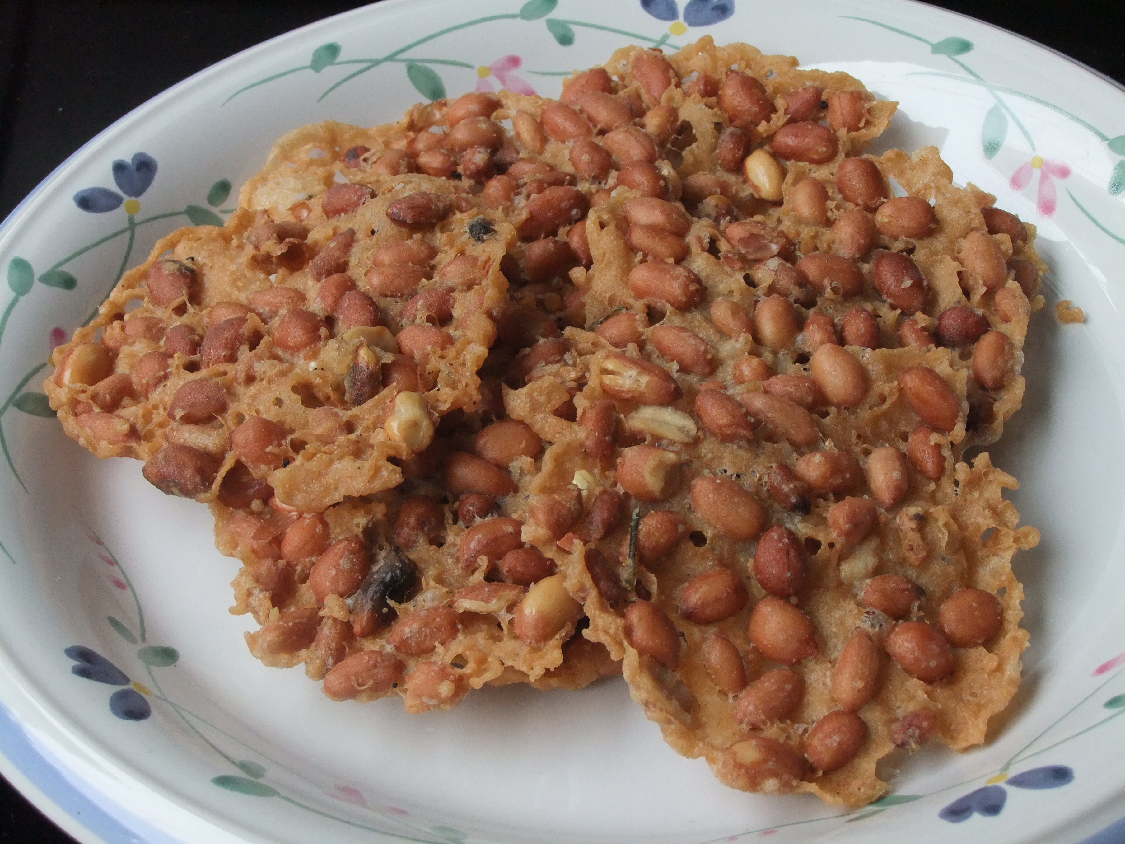 Rempeyek